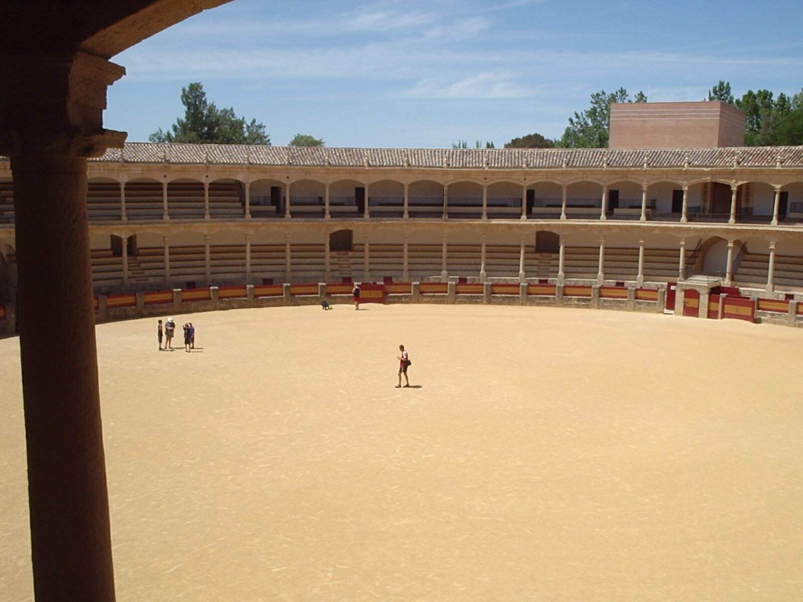 Eigen werk (2003)